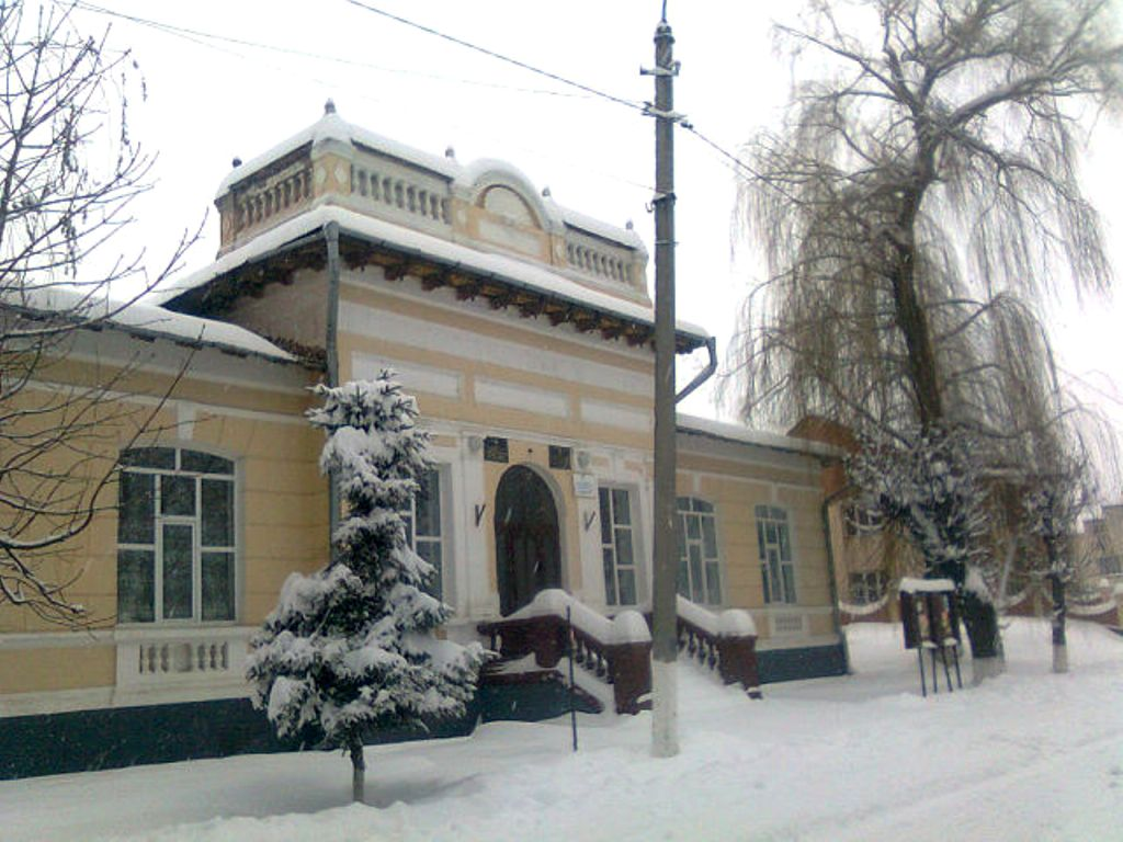 Fosta sinagogă (astăzi casă de cultură) din Herța, regiunea Cernăuți, Ucraina